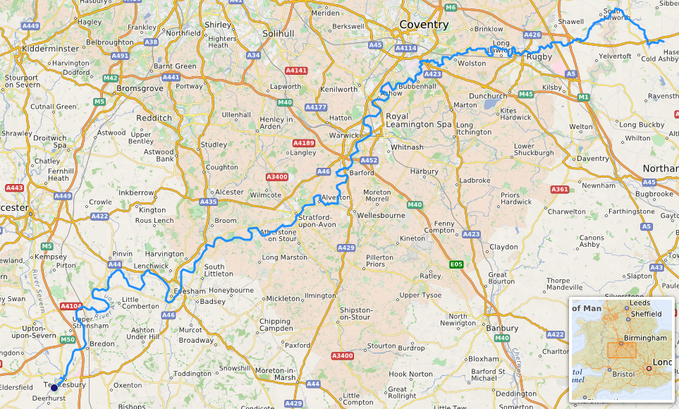 carte réalisée sur umap, [1] This map may be incomplete, and may contain errors. Don't rely solely on it for navigation.